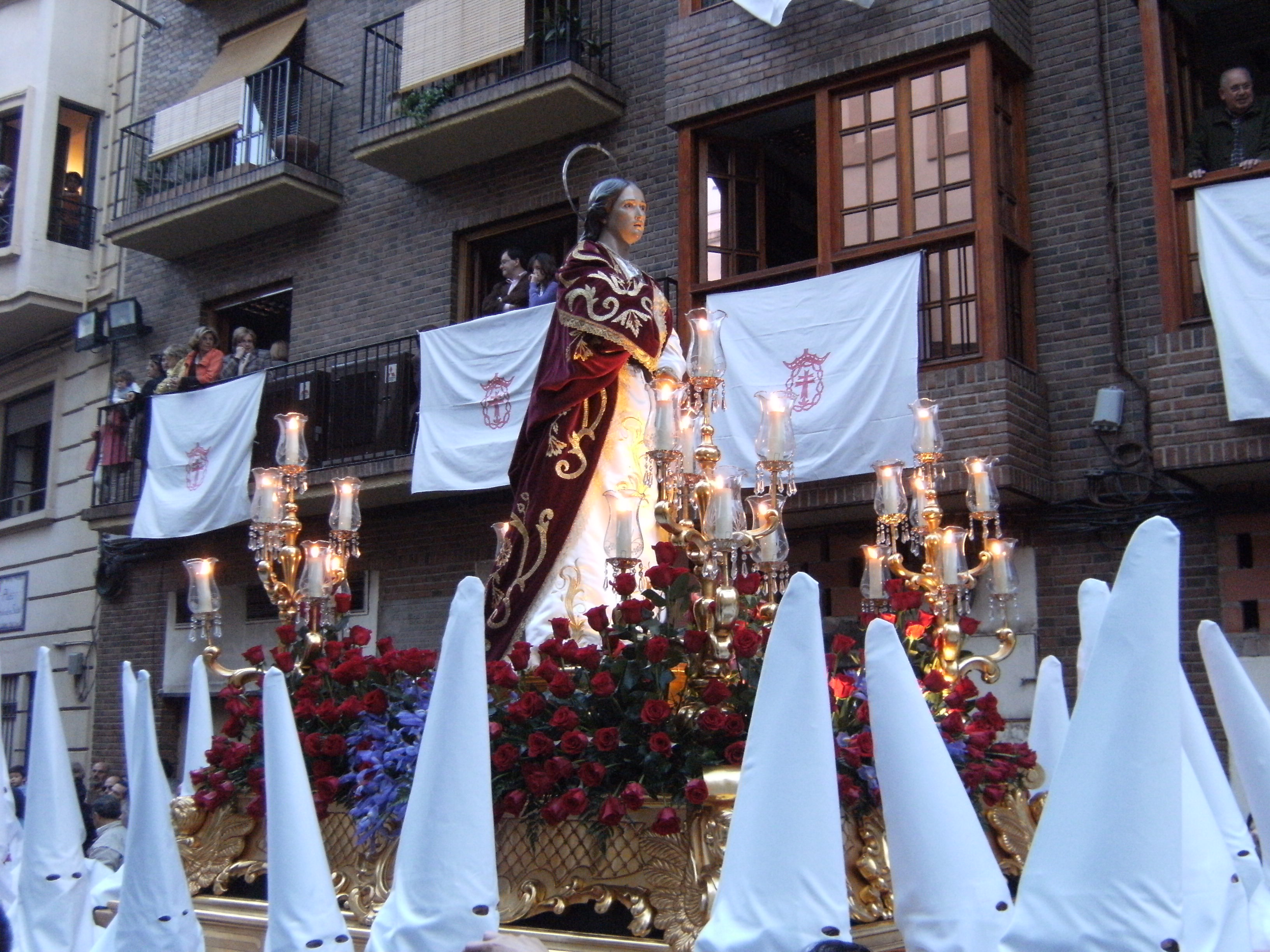 Paso de San Juan, perteneciente a la Pontificia, Real, Hospitalaria y Primitiva Asociación del Santísimo Cristo de la Salud, que desfila el Martes Santo de la Semana Santa de Murcia. Talla realizada por Róque López en 1795.